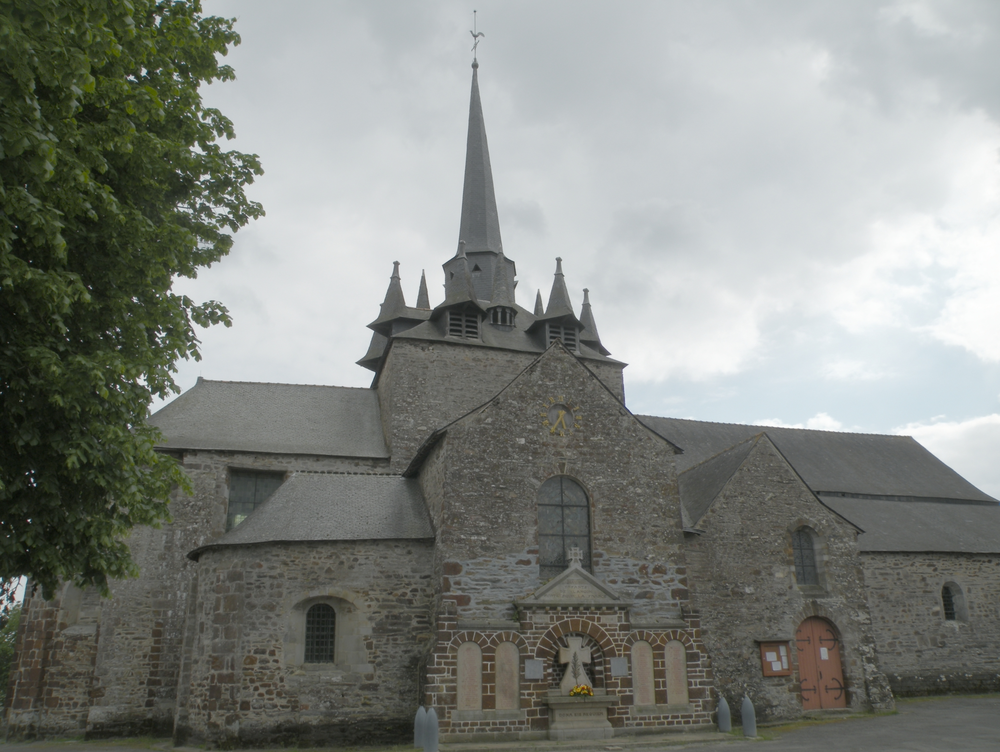 Église Saint-Pierre de Langon, façade nord.